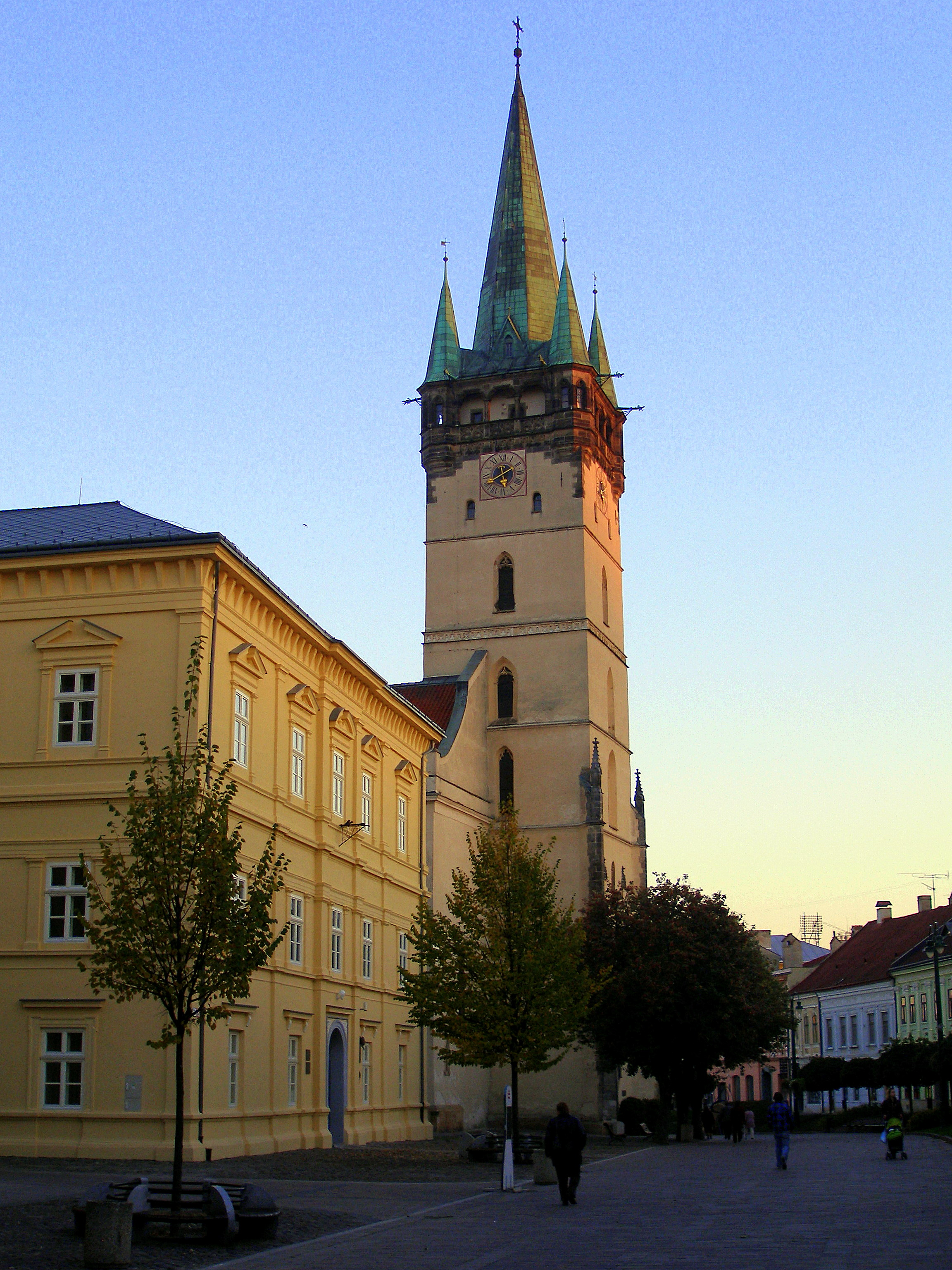 Hlavná ulica v meste Prešov. Jesenný, nedeľný podvečer 2010. Konkatedrála sv. Mikuláša.